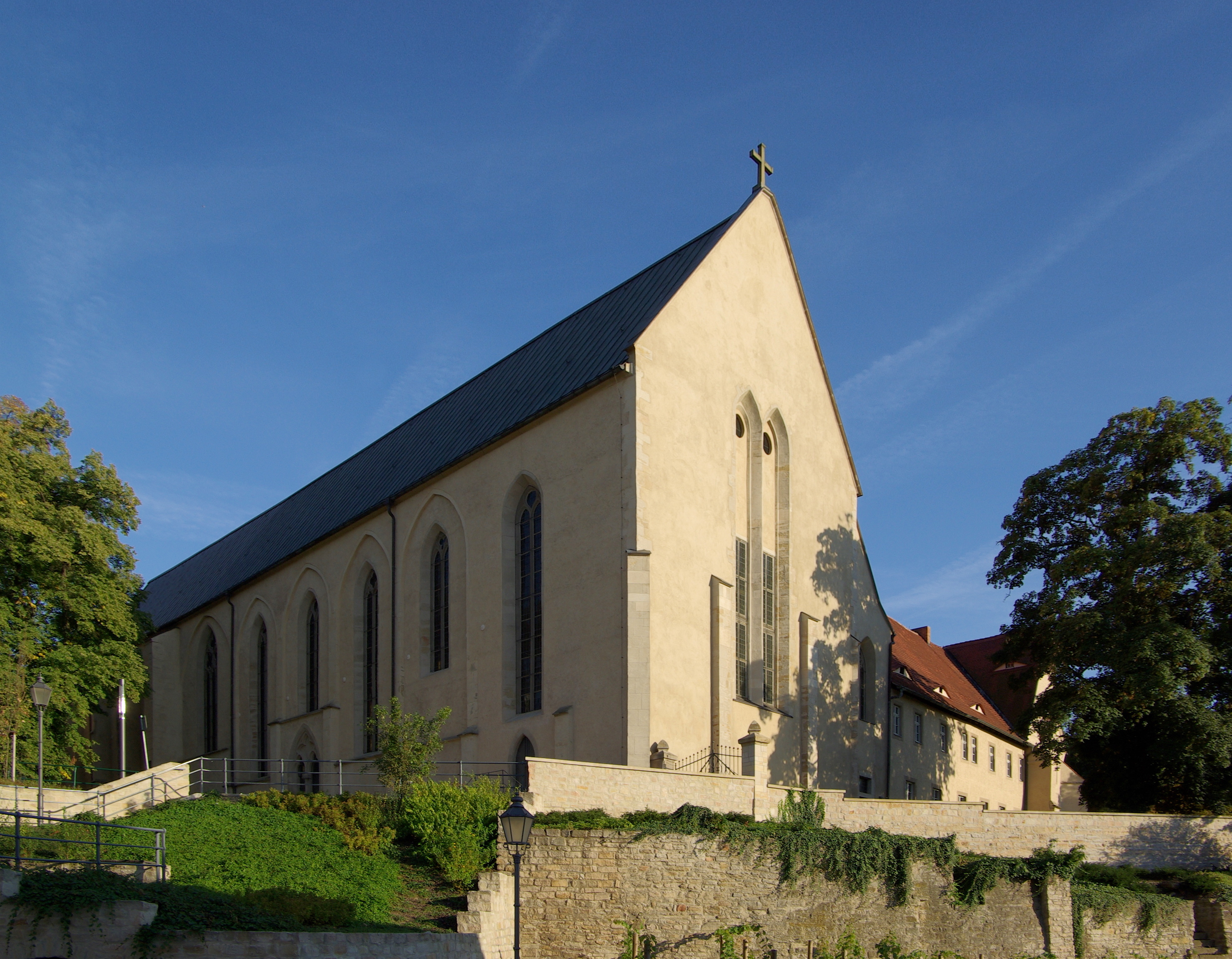 Zeitz, Franziskanerkloster, Kirche